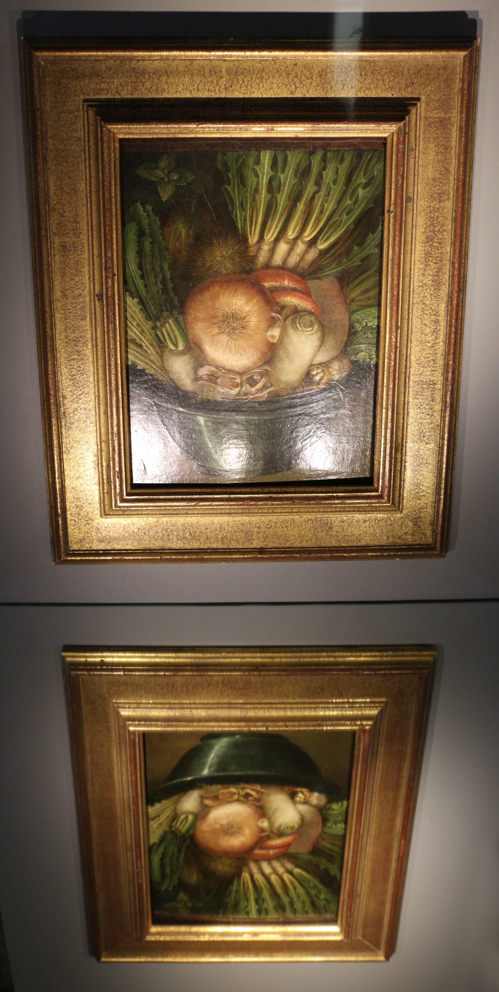 Palazzo Ala Ponzone This is a photo of a monument which is part of cultural heritage of Italy.